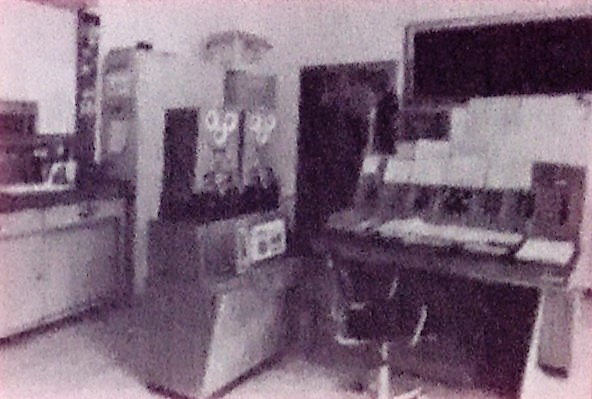 Colle Isarco - Ufficio movimenti